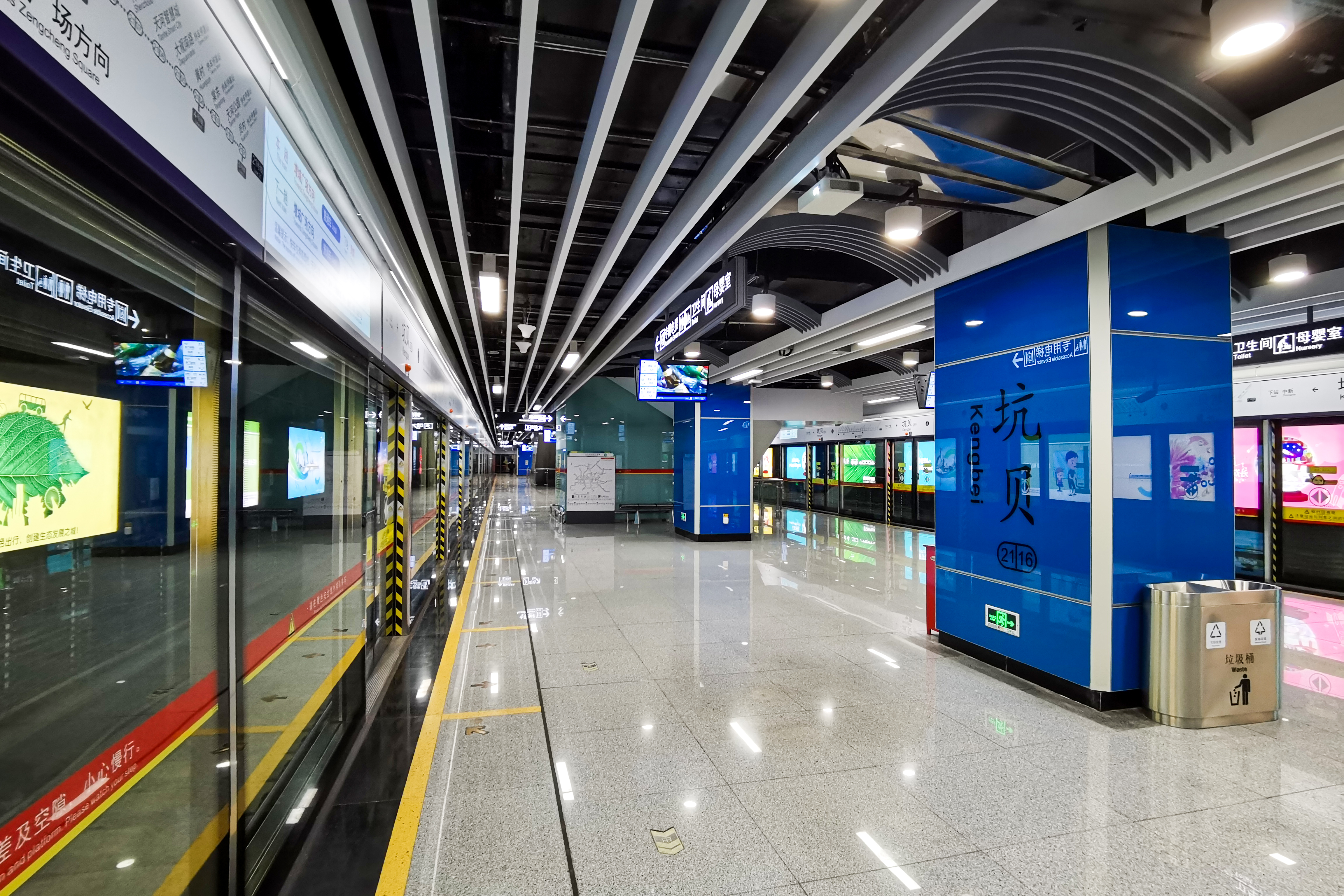 广州地铁坑贝站